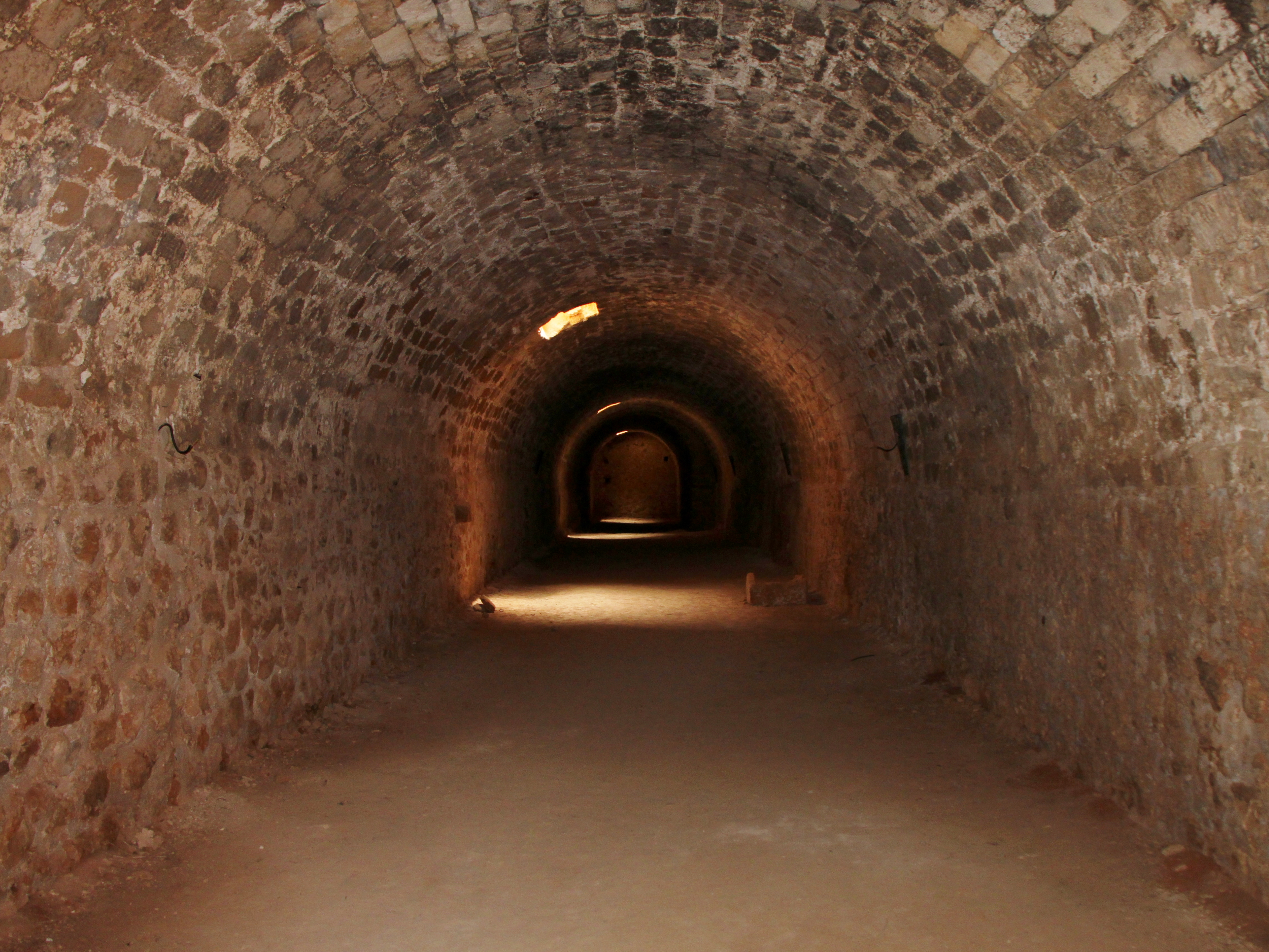 Lagerraum an der Nordwand der Fortezza von Rethymno (Φορτέτζα του Ρεθύμνου), Festungsanlage innerhalb der Stadt Rethymno, Regionalbezirk Rethymno, Kreta, Griechenland